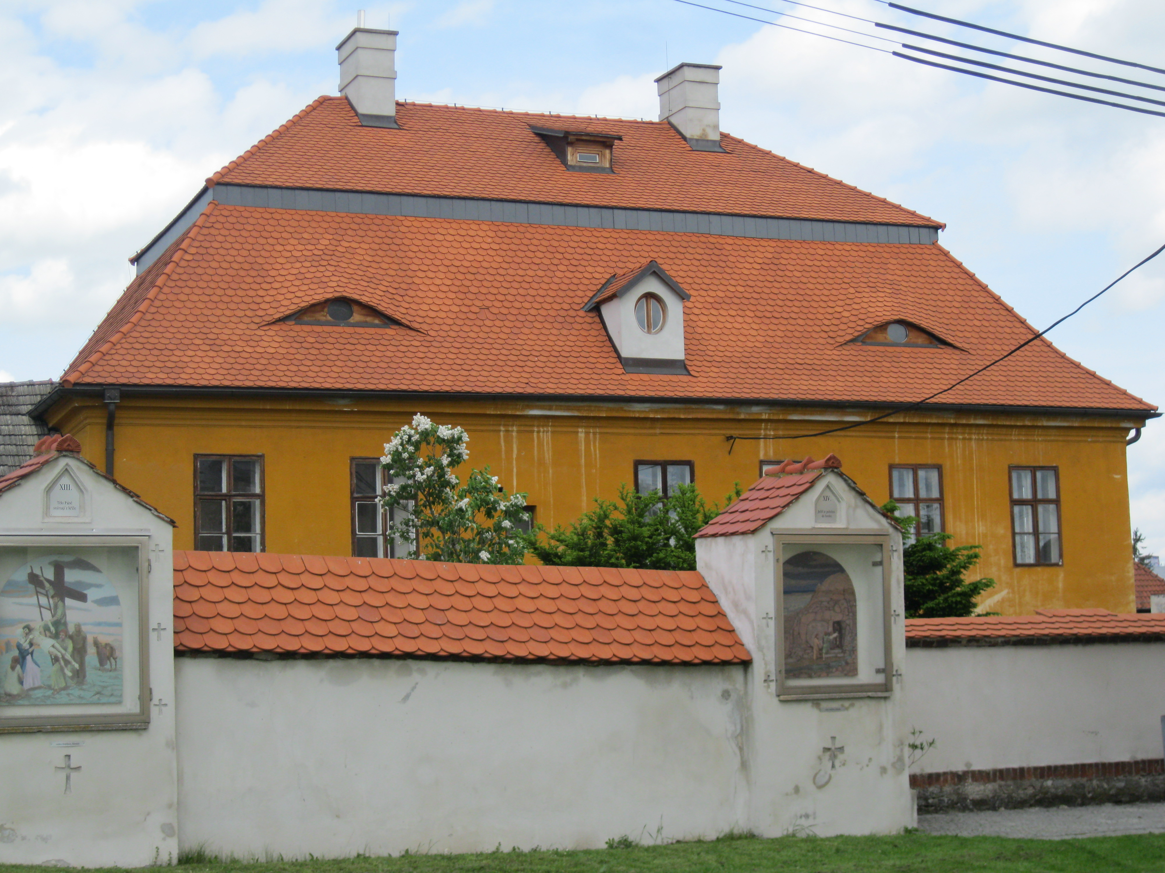 Fara (Olomouc), Zolova ul. 36/3, Olomouc